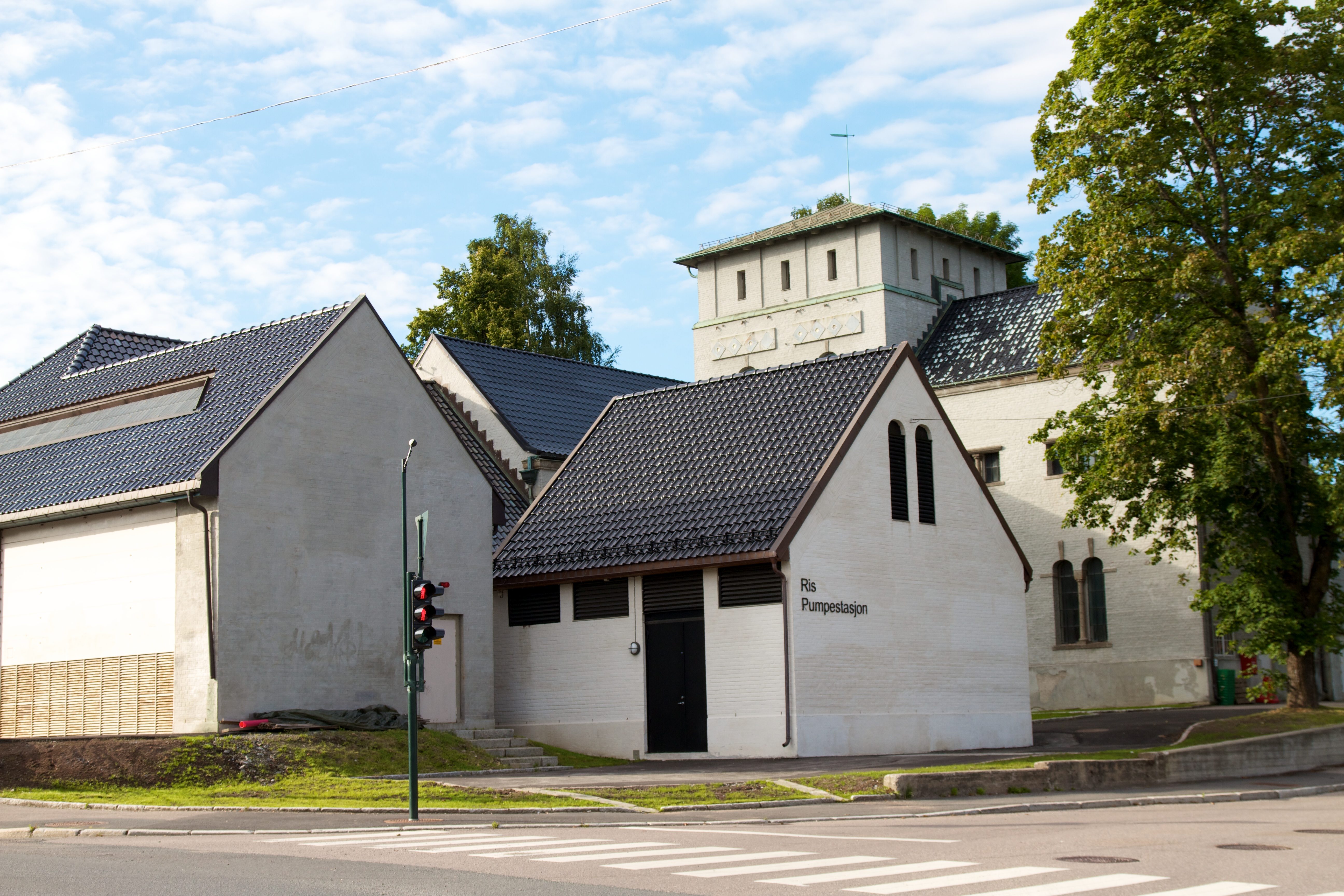 Ris Pumpestasjon i Oslo.